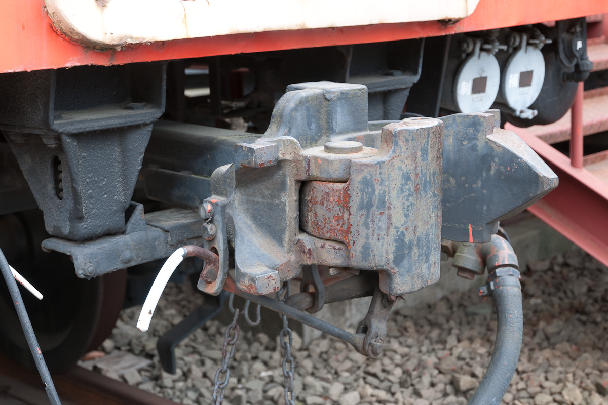 国鉄気動車の自動密着連結器。碓氷鉄道文化村の保存車、キハ20 467。